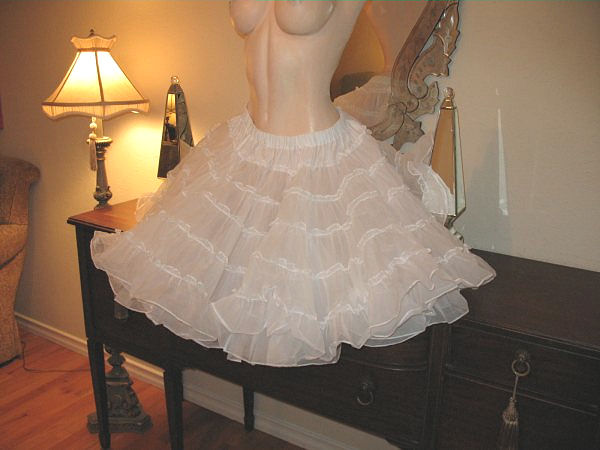 petticoat